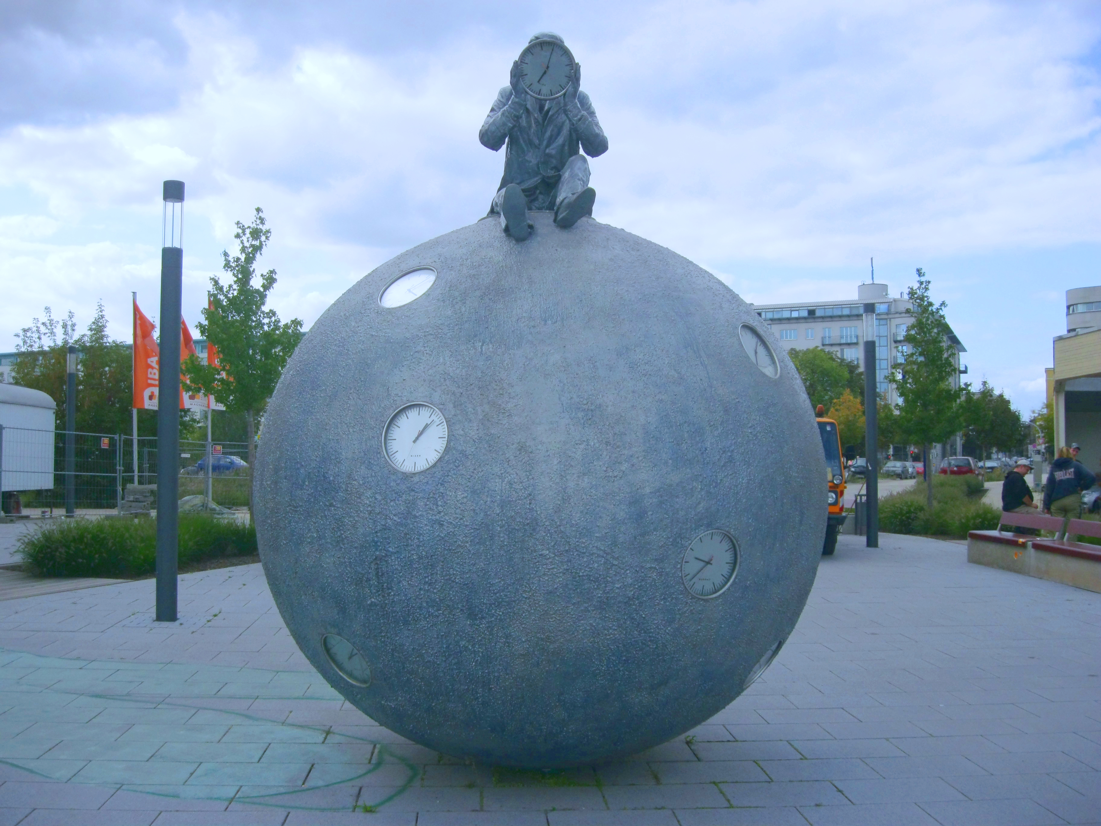 Magdeburger Zeitzähler Künstlerin: Gloria Friedemann Kunststoff: Metall Standort: Elbuferpromenade Schleinufer Magdeburg